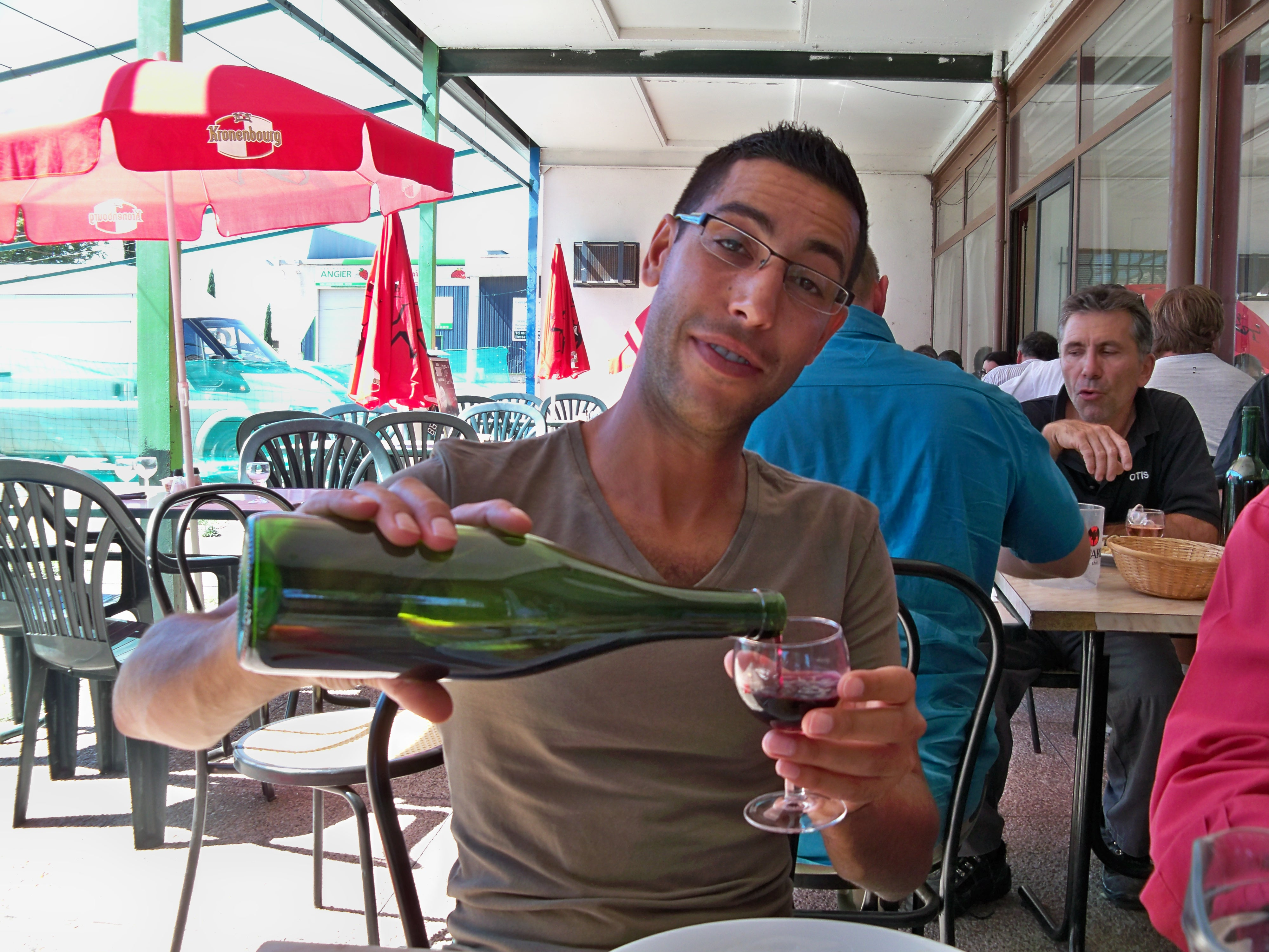 Dégustation de vin - servir